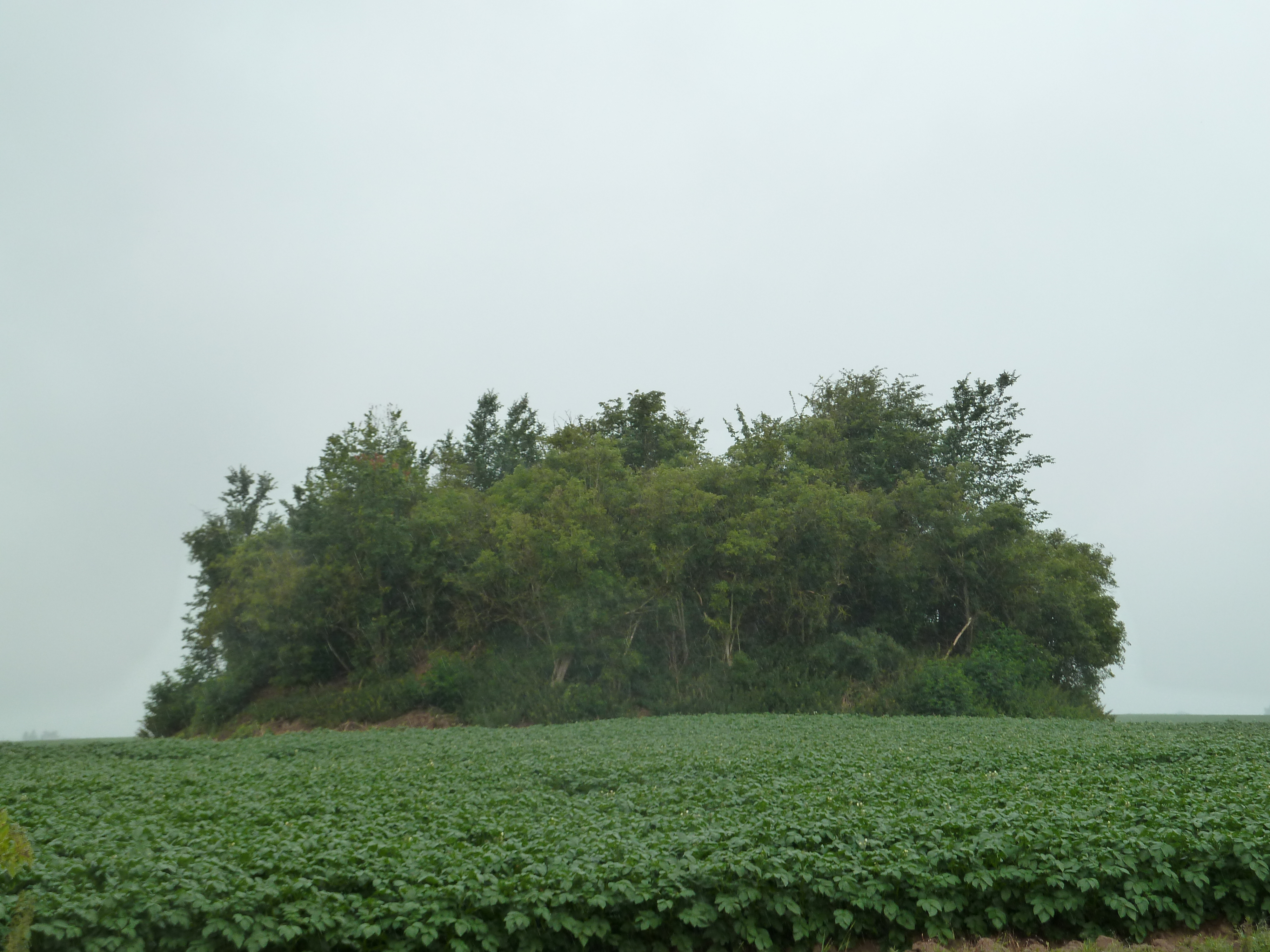 Tumulus d'Avernas, Avernas-le-Bauduin, Hannut, Belgique